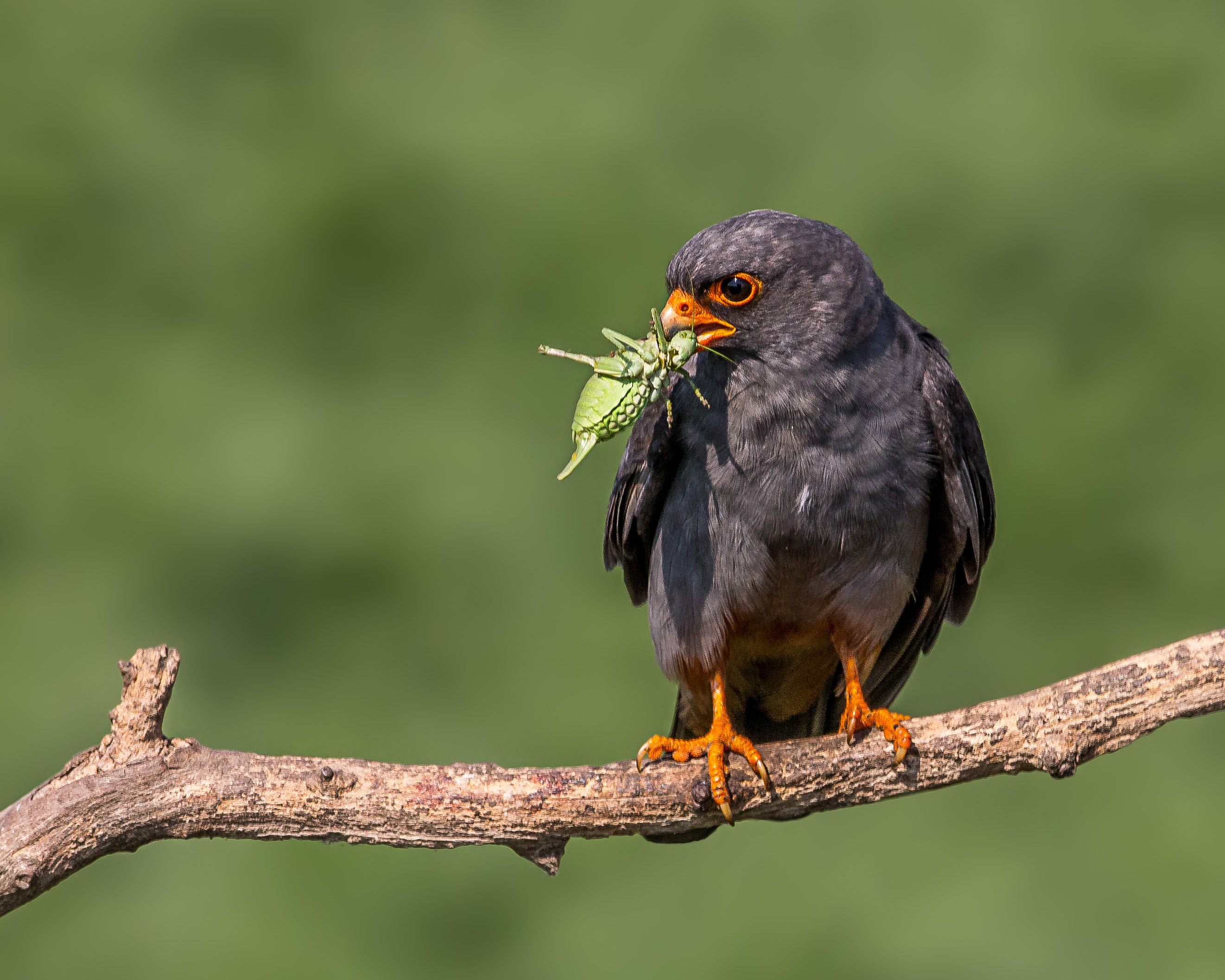 Taken in Hungary.